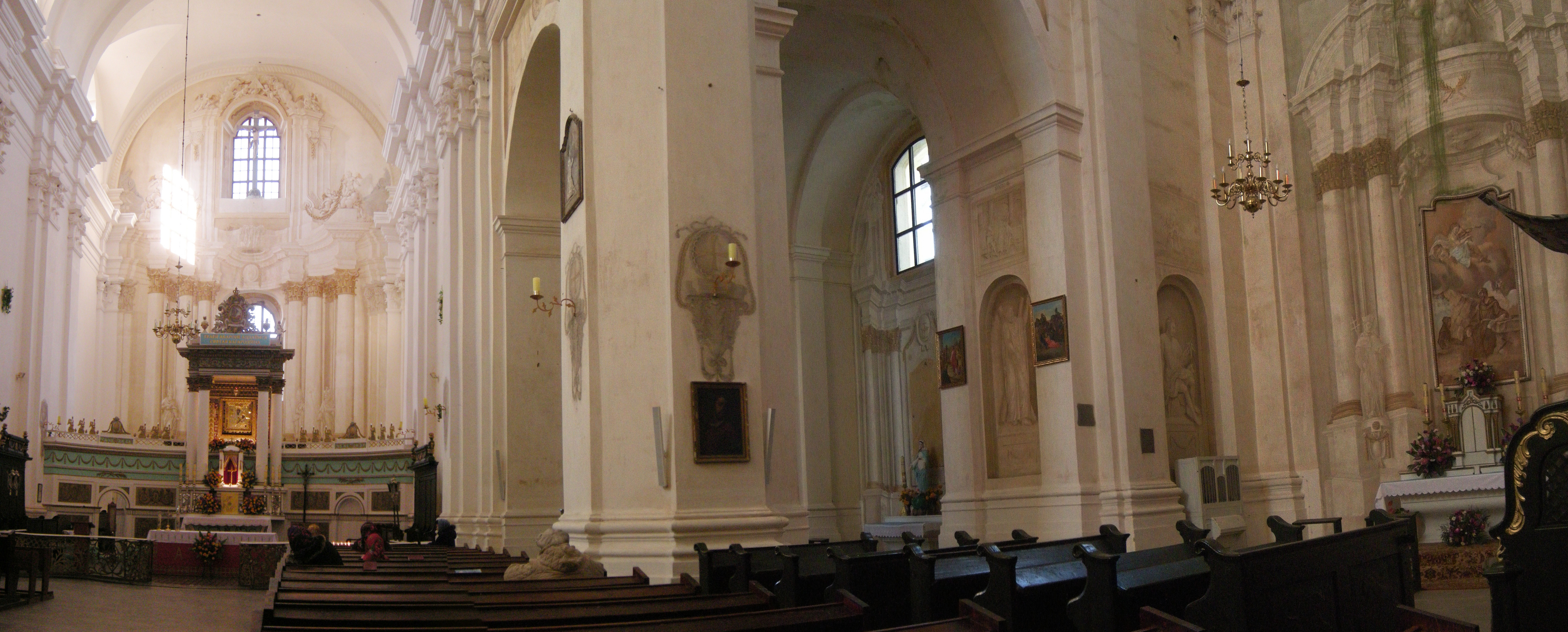 Беларуская (тарашкевіца): Комплекс былога кляштара бэрнардынцаў, дэкаратыўнае аздабленьне касьцёла: галоўны і бакавыя алтары росьпісы. в. Будслаў This is a photo of Belarusian heritage monument. Reference number: 611Г000422 ( WLM)